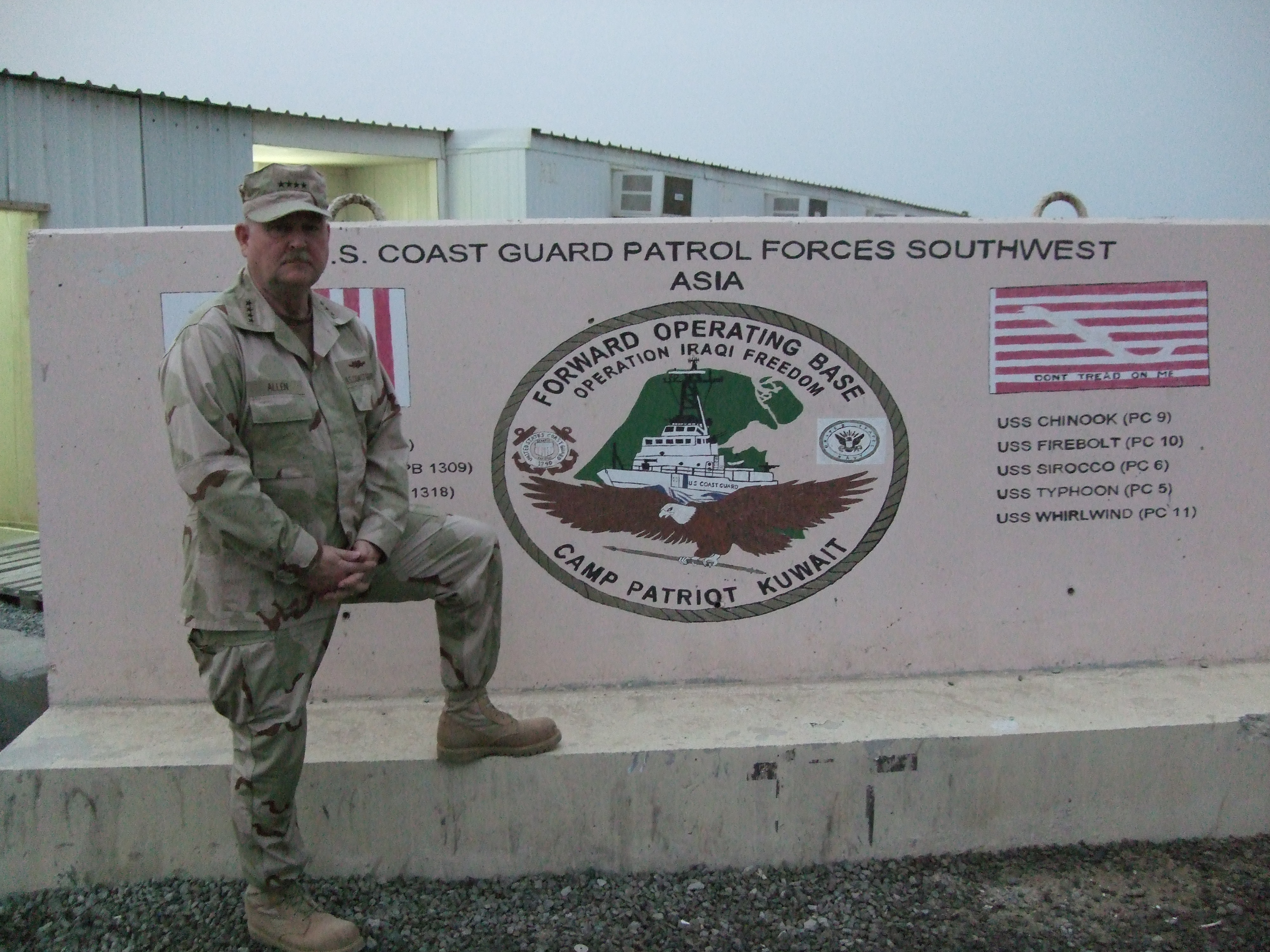 FOB PATFORSWA - KNB (Kuwait Naval Base)